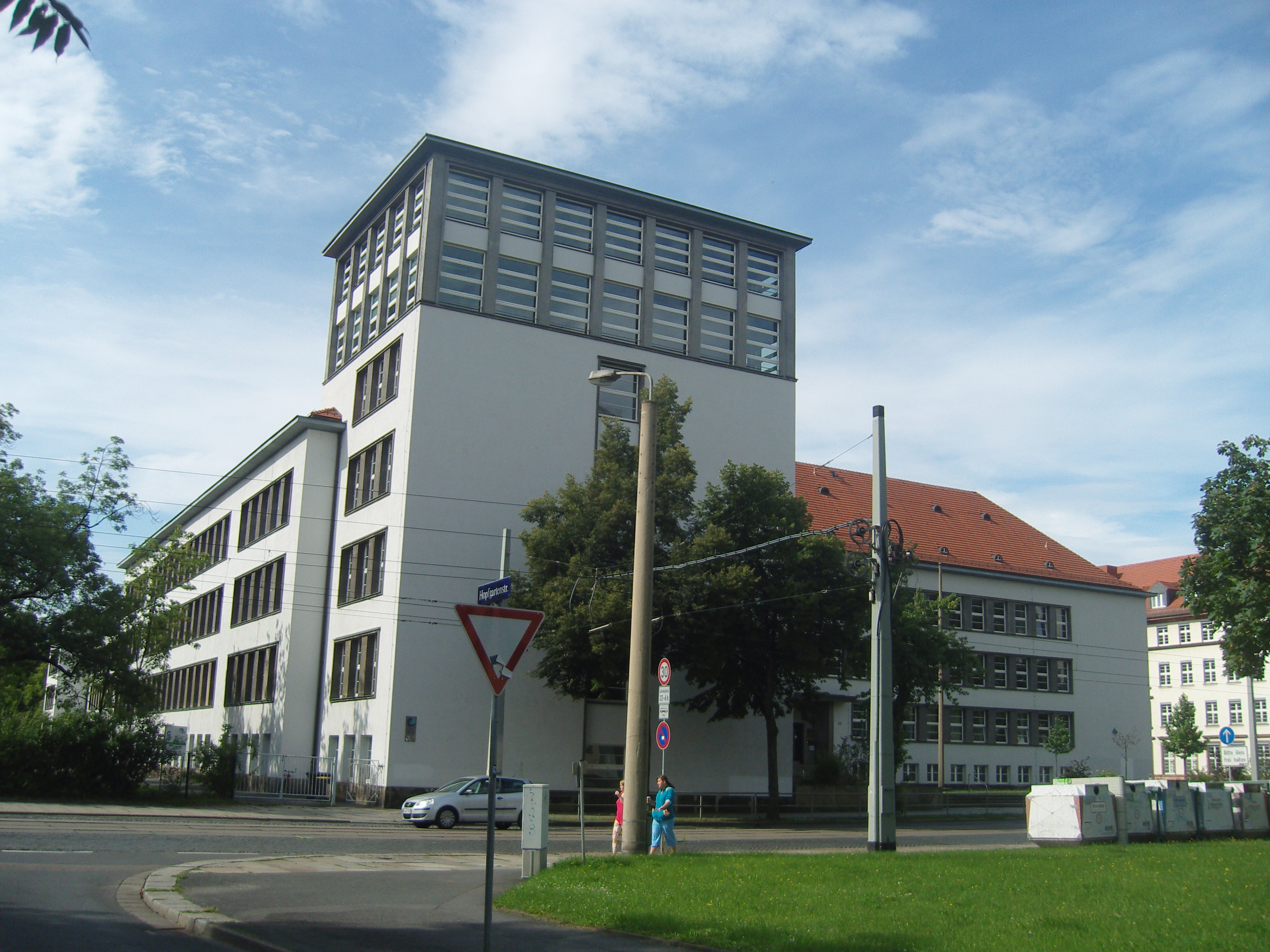 Denkmalgeschütztes Schulgebäude mit Hofanlage und Einfriedung in der Gerokstraße 22 in Dresden; Berufliches Schulzentrum für Technik "Gustav Anton Zeuner"